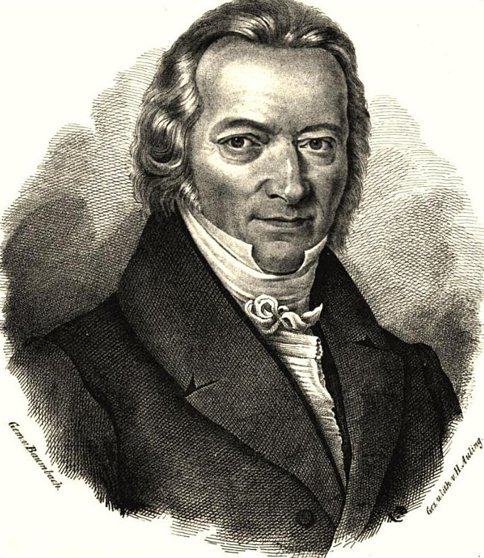 Der katholische Theologe Johann Christoph Schlüter (1767–1841). Lithographierte Zeichnung von Heinrich Auling nach einem Gemälde von Schlüters Bekannten Carl Baumbach.